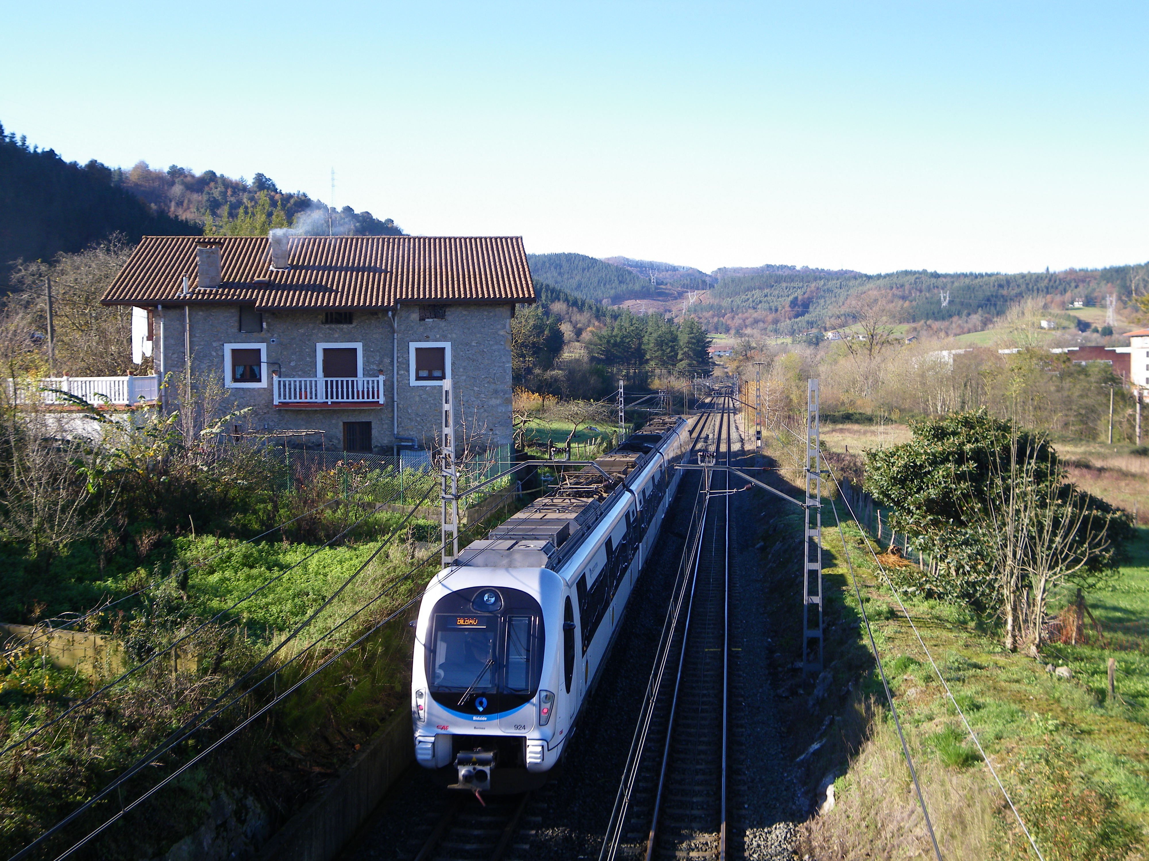 Bermeo deituriko tren bat, Bediako udalerrian (Bizkaia) dagoen Barroeta auzoan.